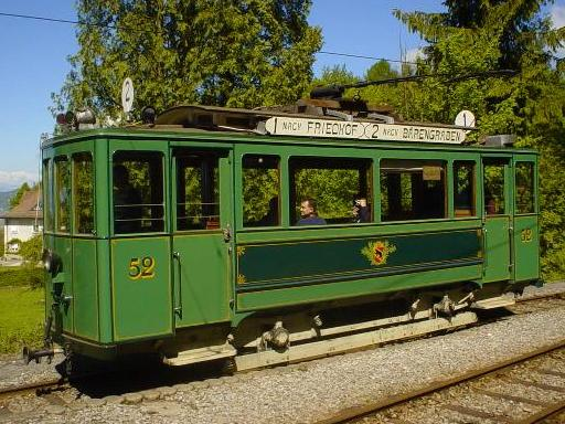 Historischer Strassenbahn Motorwagen Ce 2/2 52 der ehemaligen Städtische Strassenbahnen Bern (SSB), heute Bernmobil, Städtische Verkehrsbetrieb Bern (SVB), auf dem Museums-Areal der Museumsbahn Blonay–Chamby (BC) in Chamby-Musée (Chaulin) im Jahre 2003.